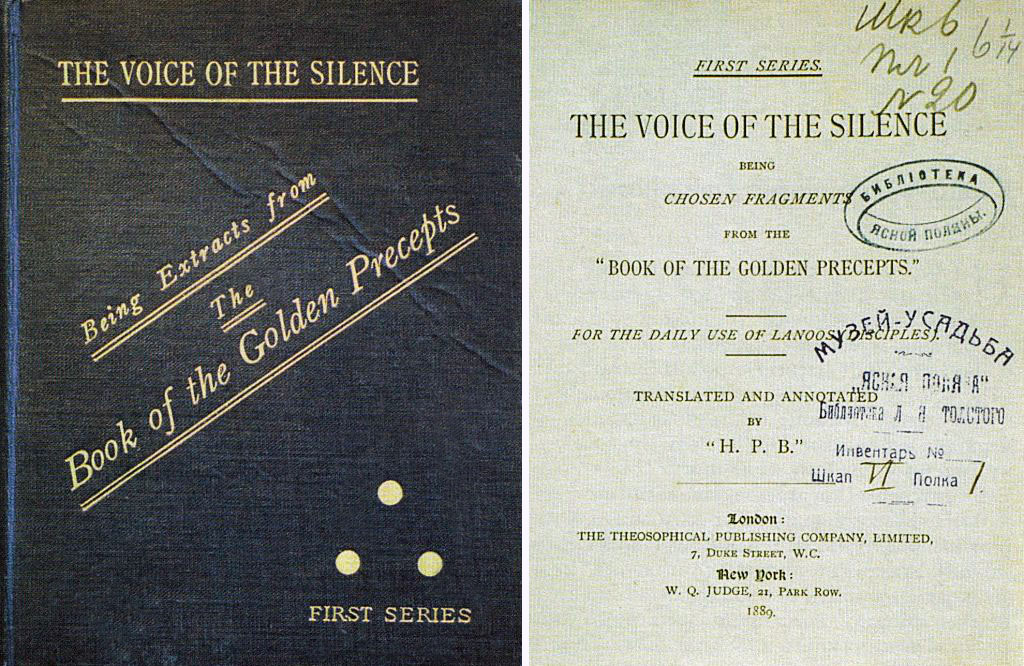 Книга «Голос Безмолвия. Семь врат. Два пути», подаренная Е. П. Блаватской Л. Н. Толстому в 1889-1991 годах. Книга представлена в экспозиции Дома-Музея Л. Н. Толстого в Ясной Поляне.